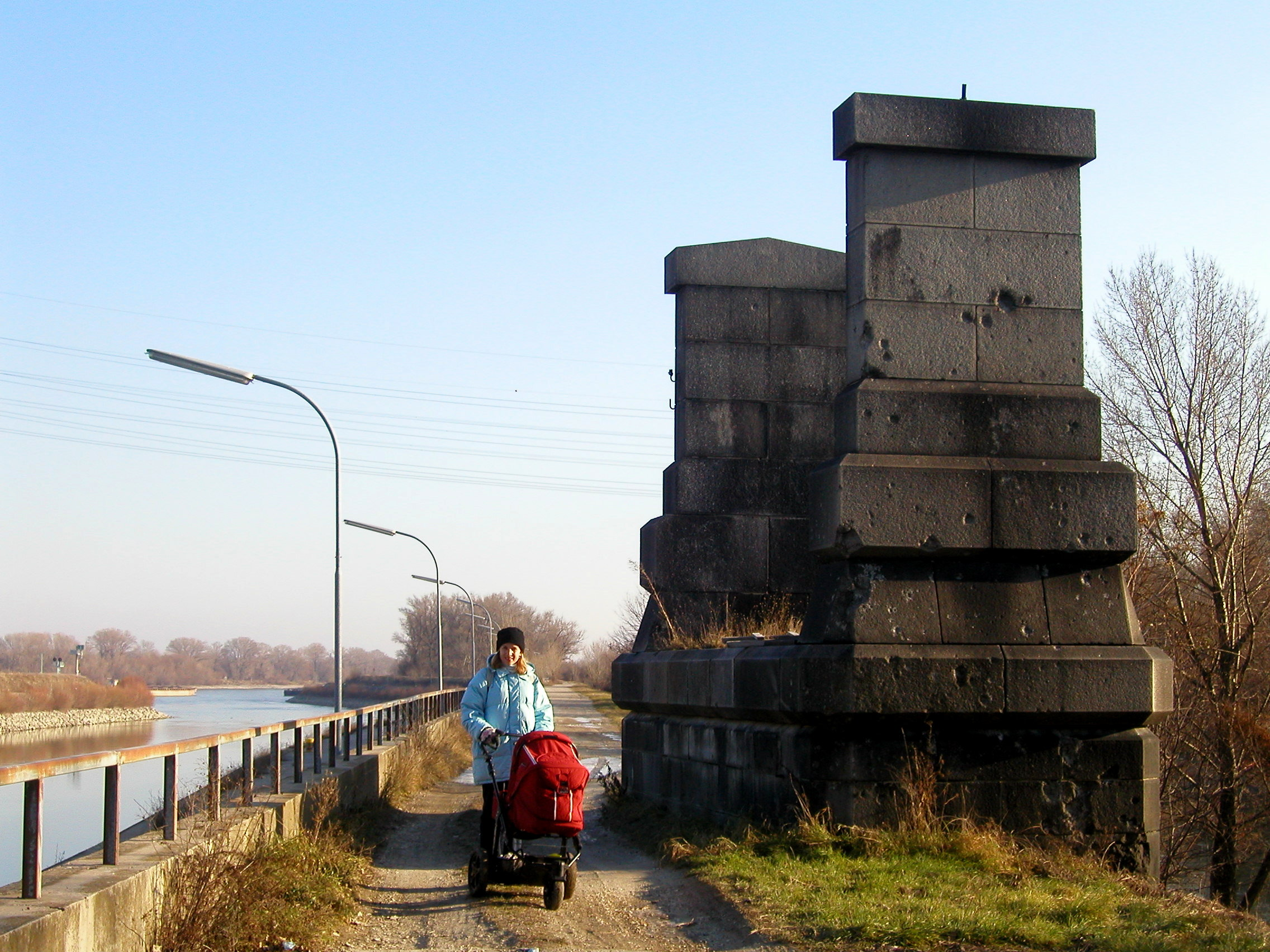 Winterhafenbrücke.